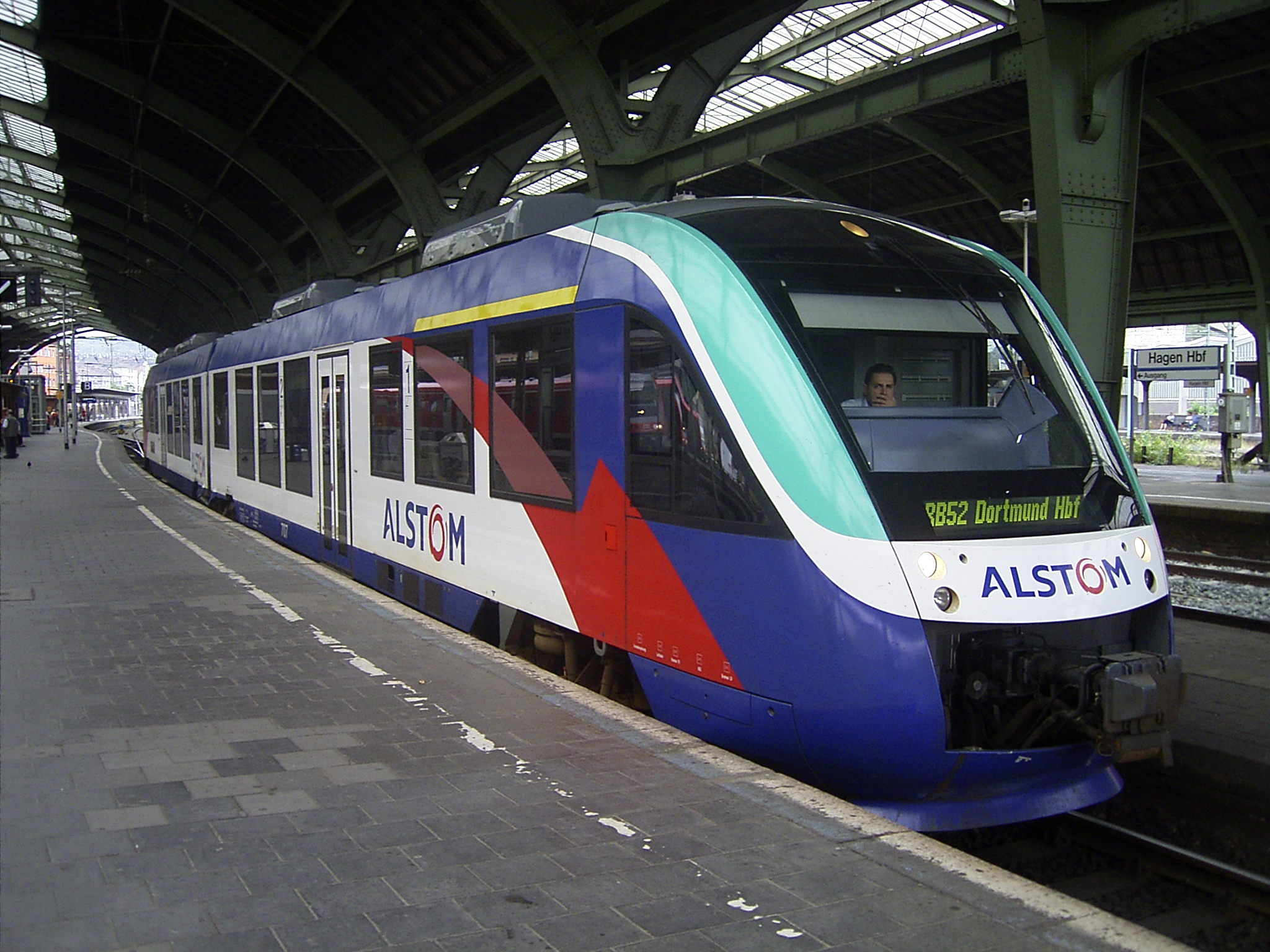 Da ein Talent der Dortmund-Märkischen Eisenbahn durch einen Unfall nicht benutzbar ist, wurde 2003 ersatzweise dieser Alstom Coradia LINT-Vorführwagen gemietet.